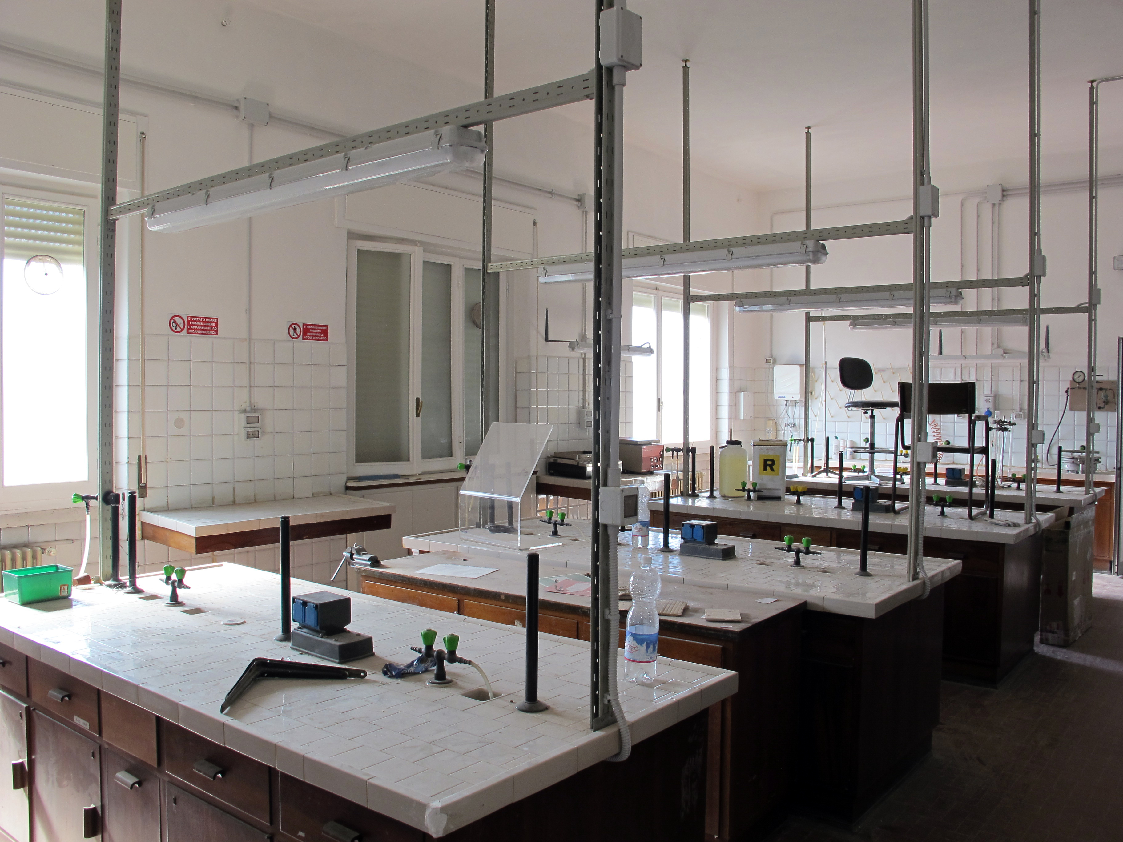 Istituto agronomico per l'oltremare, int., laboratori